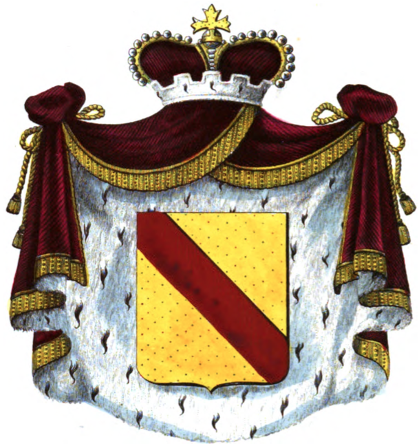 Armoiries de la Maison de Ligne